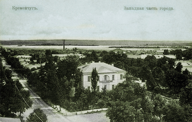 Postcards of old Kremenchuk. Західна частина міста.